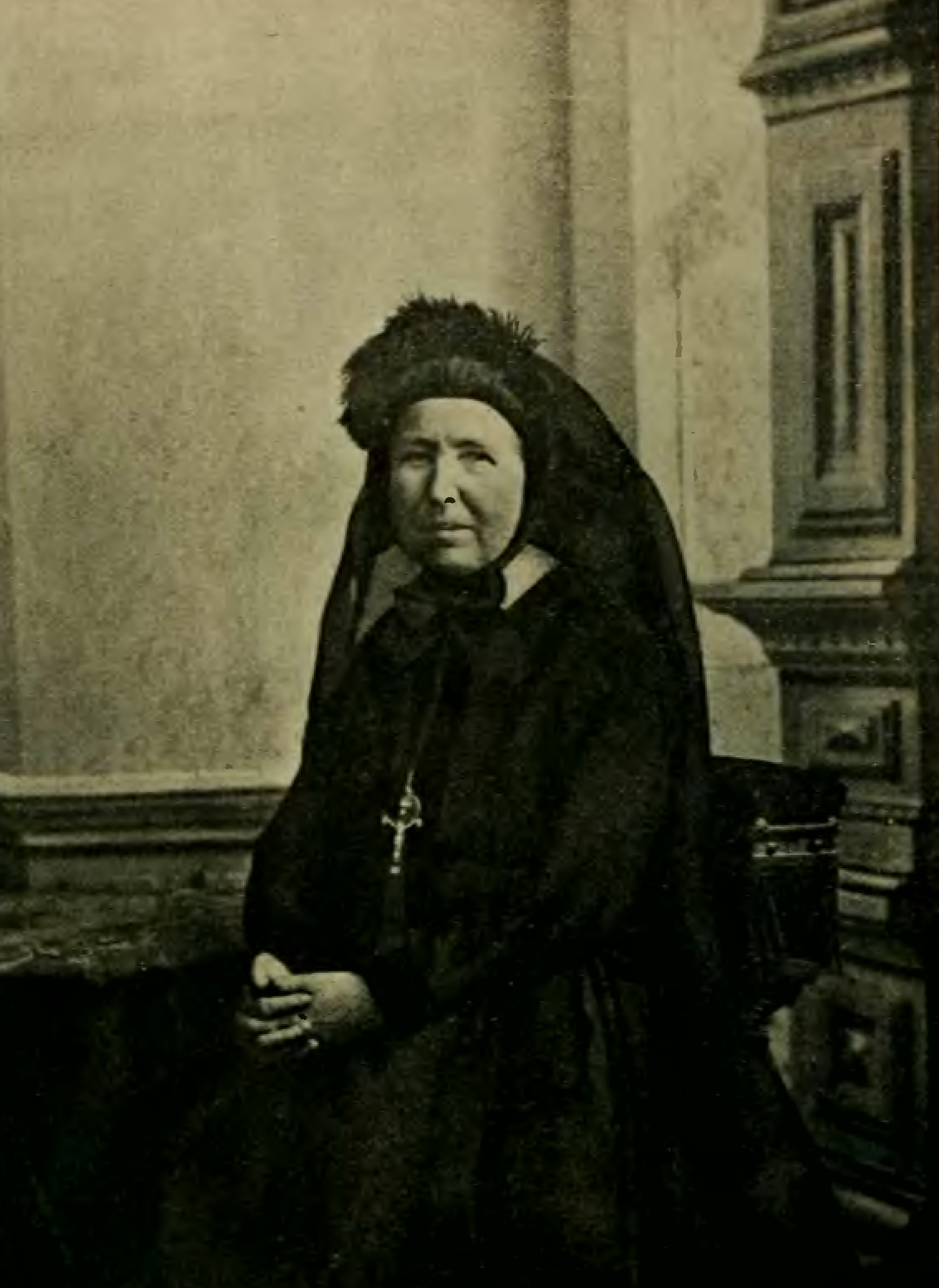 Tiré de la "Vie de Mélanie, bergère de la Salette, écrite par elle-même en 1900. Introduction par Léon Bloy. Paris, Mercure de France, 1912"